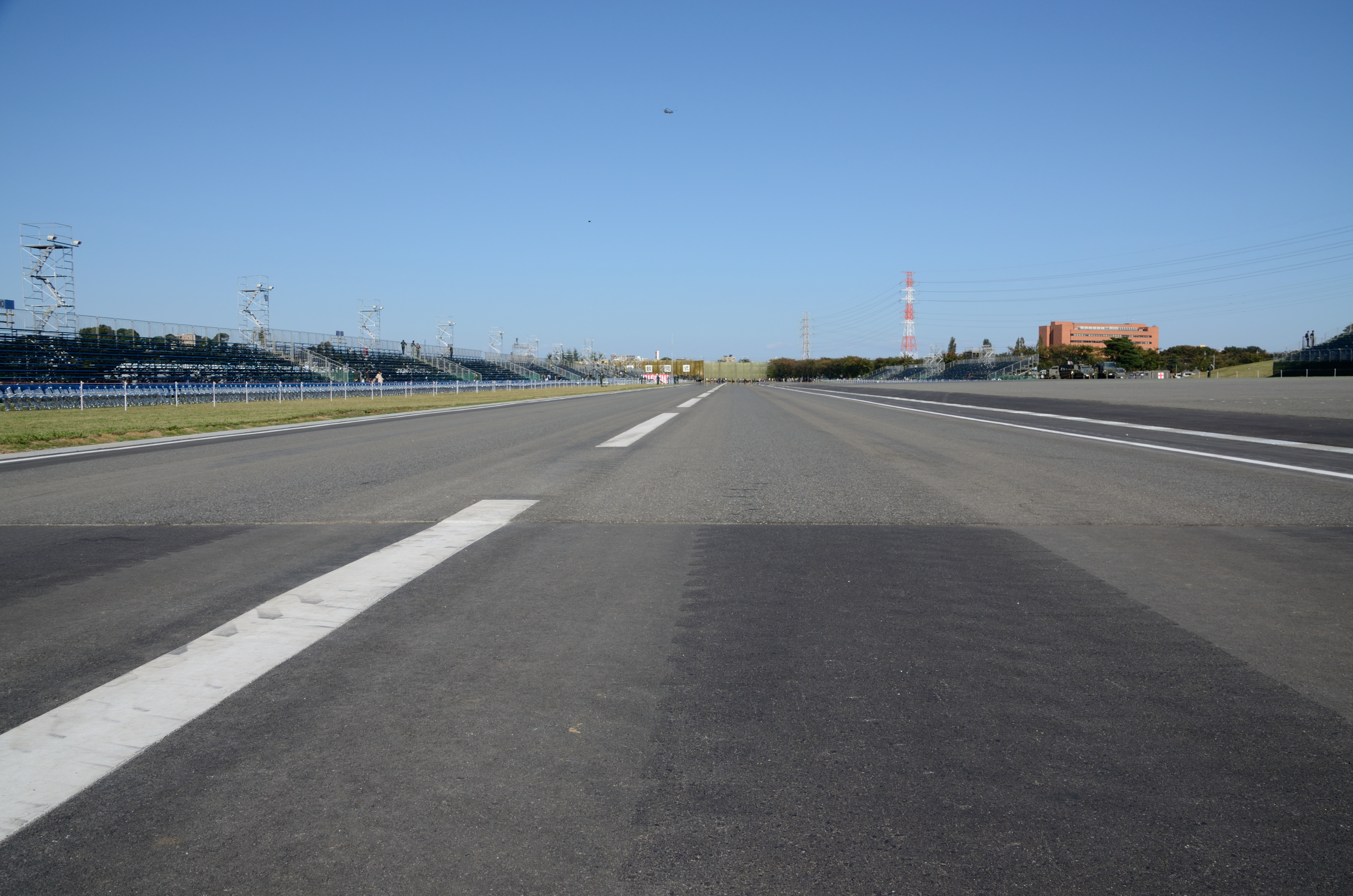 自衛隊中央観閲式の会場。朝霞駐屯地に隣接する朝霞訓練場の中。部隊が行進する路面の両側に観覧者の仮設スタンドが並ぶ。